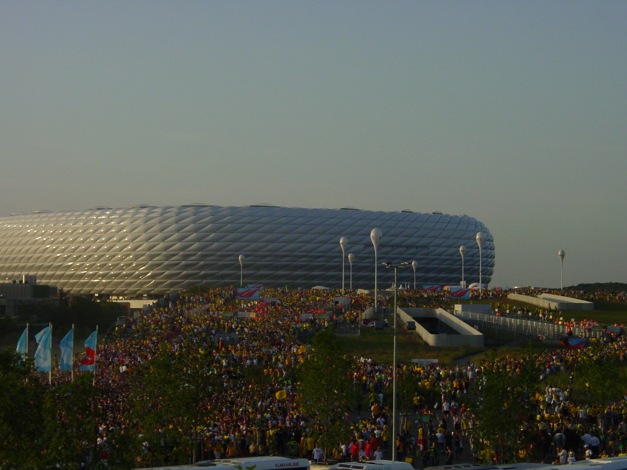 Zuschauer verlassen nach dem WM-Vorrundenspiel zwischen Brasilien und Australien die Allianz-Arena